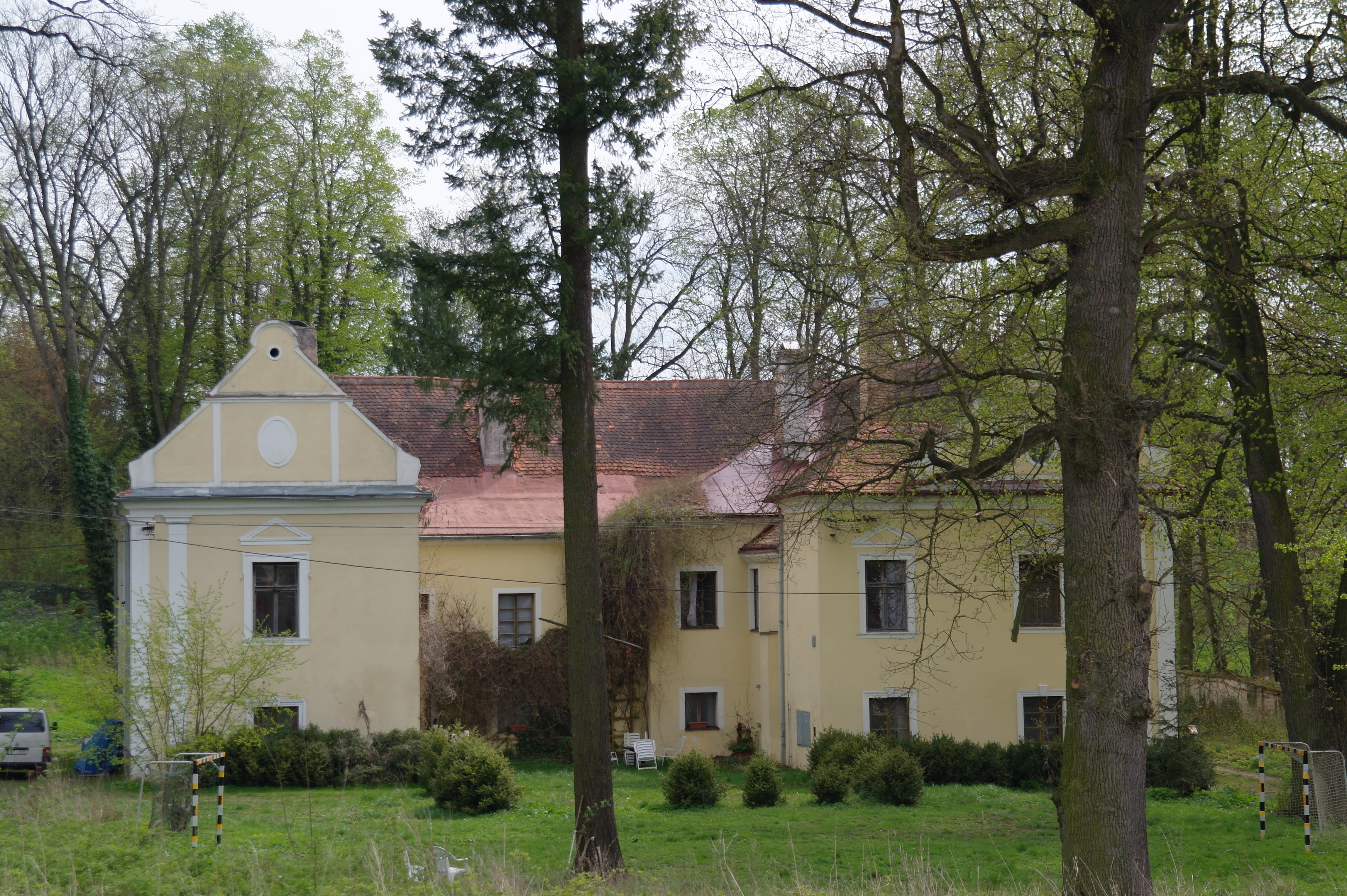 Otín